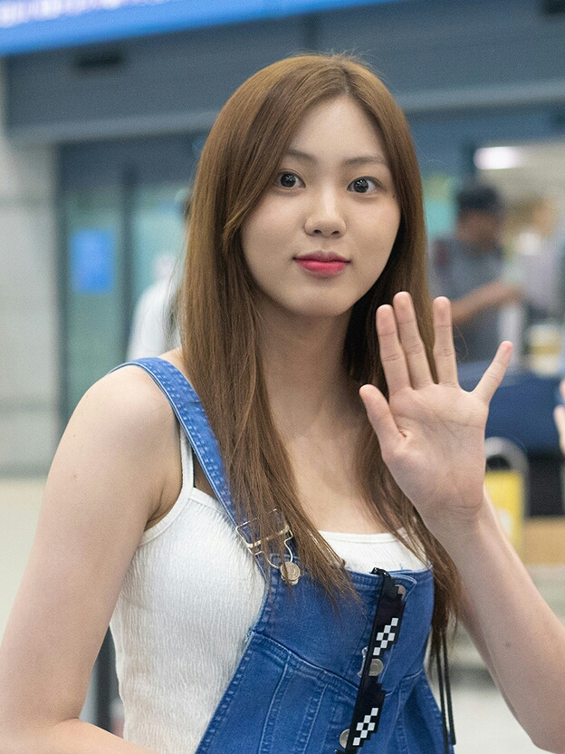 Português do Brasil: Kwon Eun-bin no Aeroporto Internacional de Incheon em 21 de julho de 2018